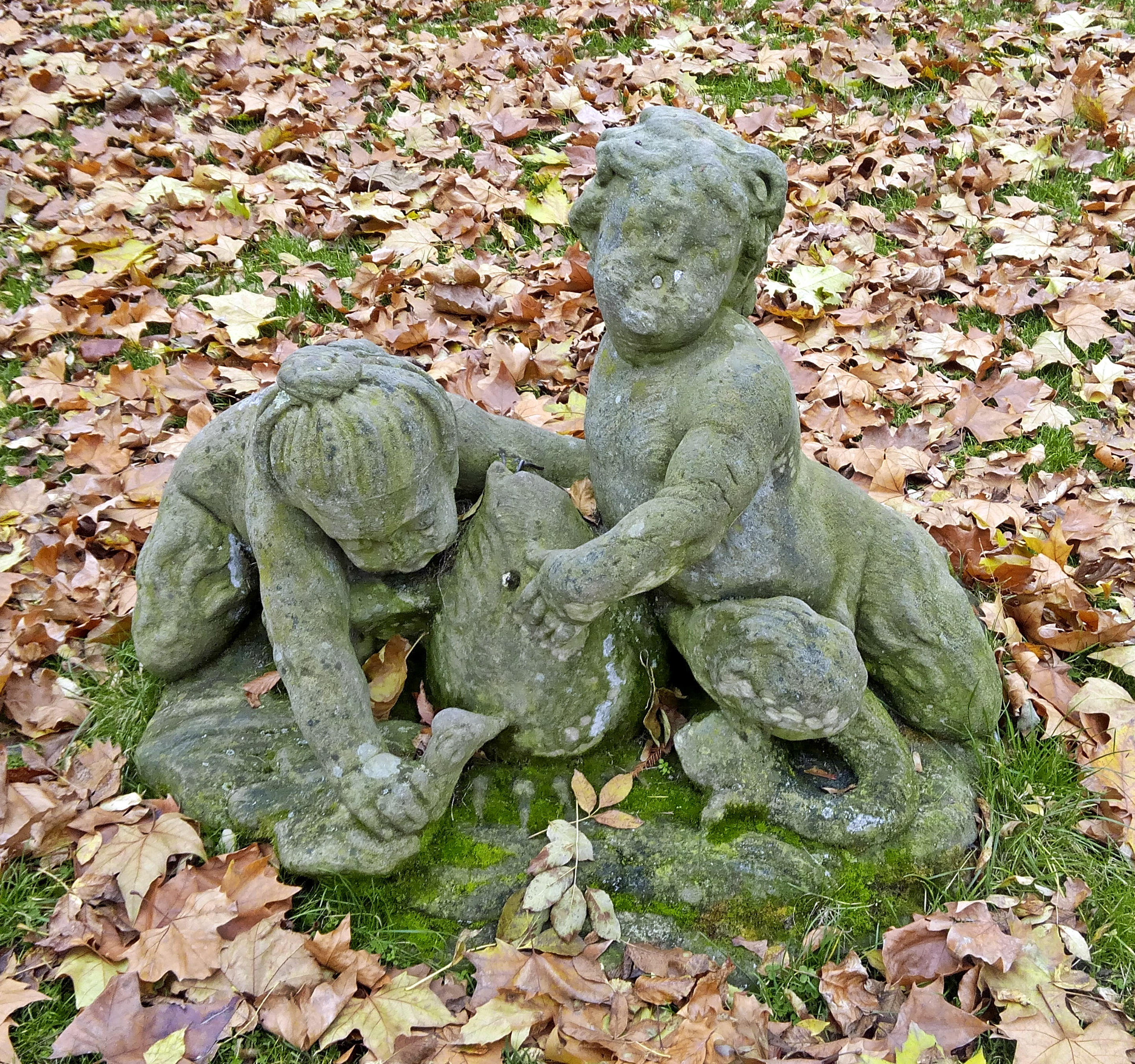 Barocke Puttogruppe, Kurpark Bad Dürkheim (verm. Spolie vom Schloss)